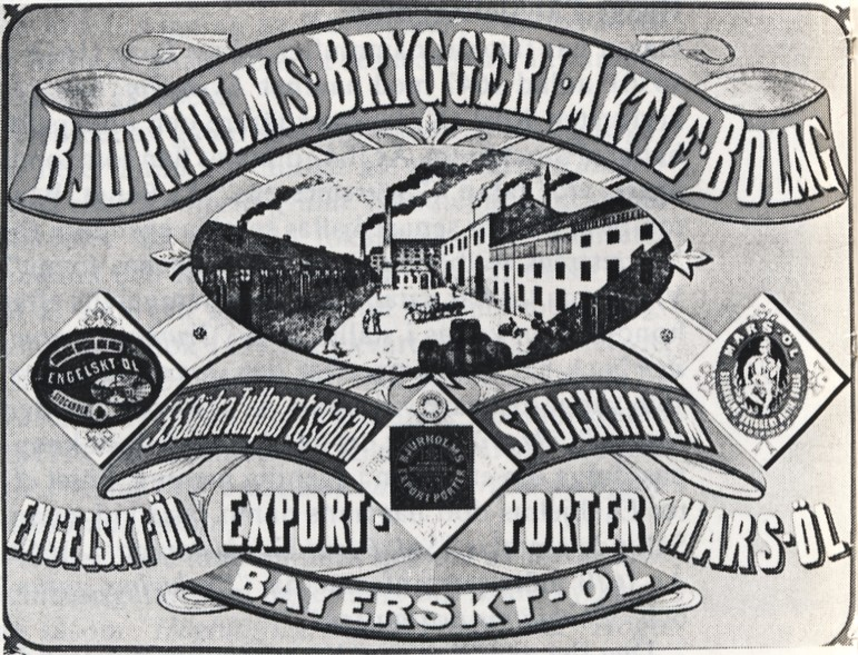 Bjurholms bryggeri på Södermalm i Stockholm, etikett